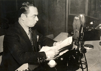 František R. Kraus speaks "on air"